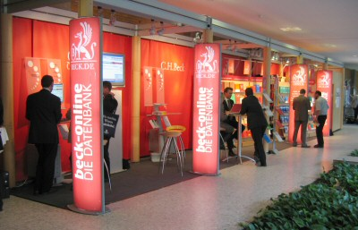 Messestand von C. H. Beck auf dem EDV-Gerichtstag 2007